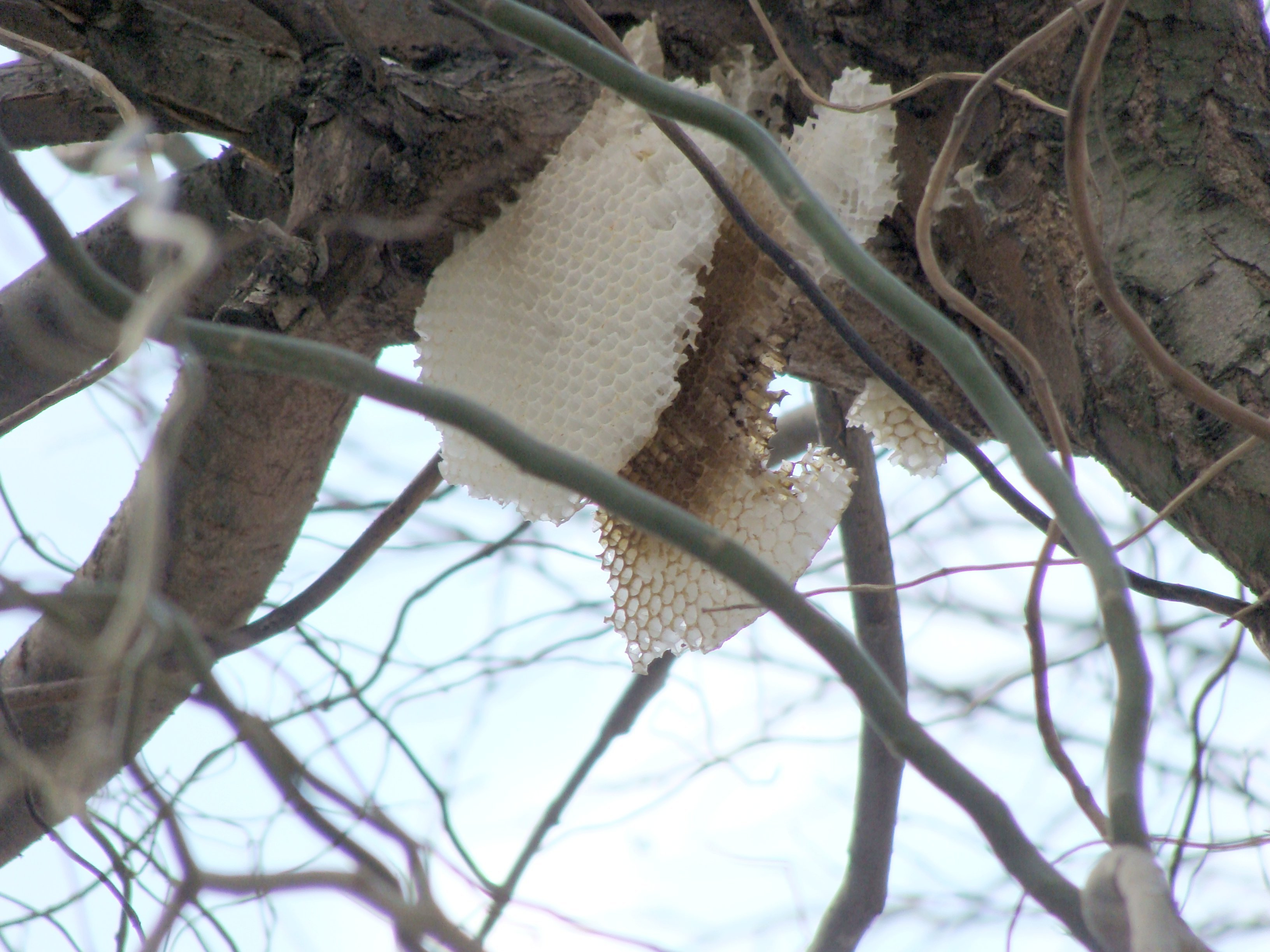 Plastry pszczele na drzewie